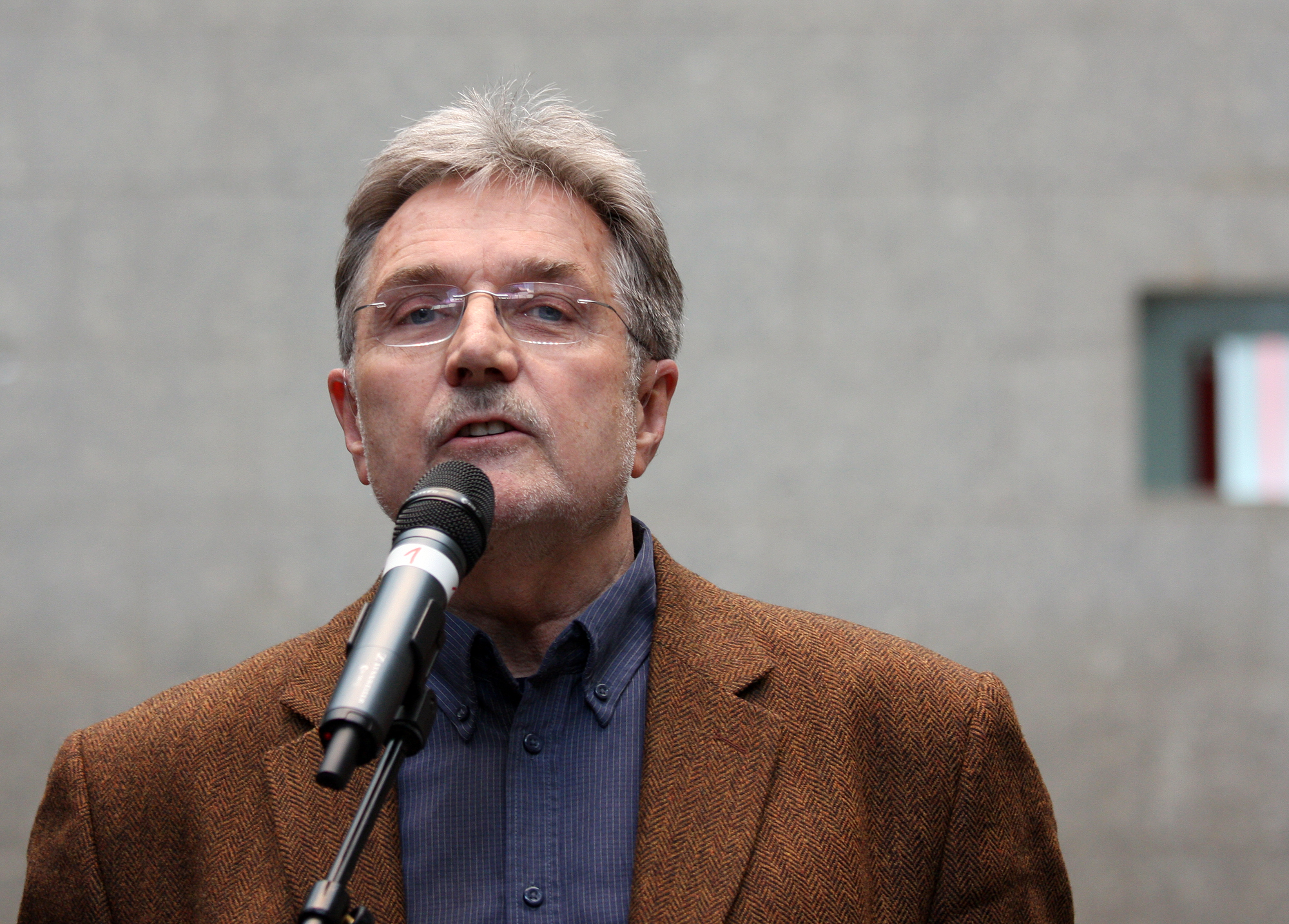 Ulrich Krings, deutscher Kunsthistoriker, ehemaliger Stadtkonservator von Köln